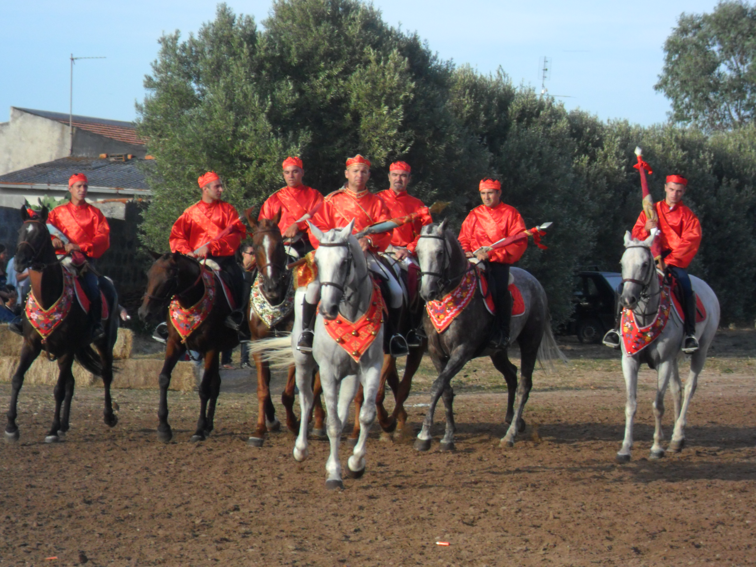 Cavalieri durante l'Ardia a Pozzomaggiore (SS)